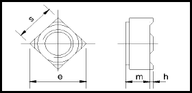 DIN 928